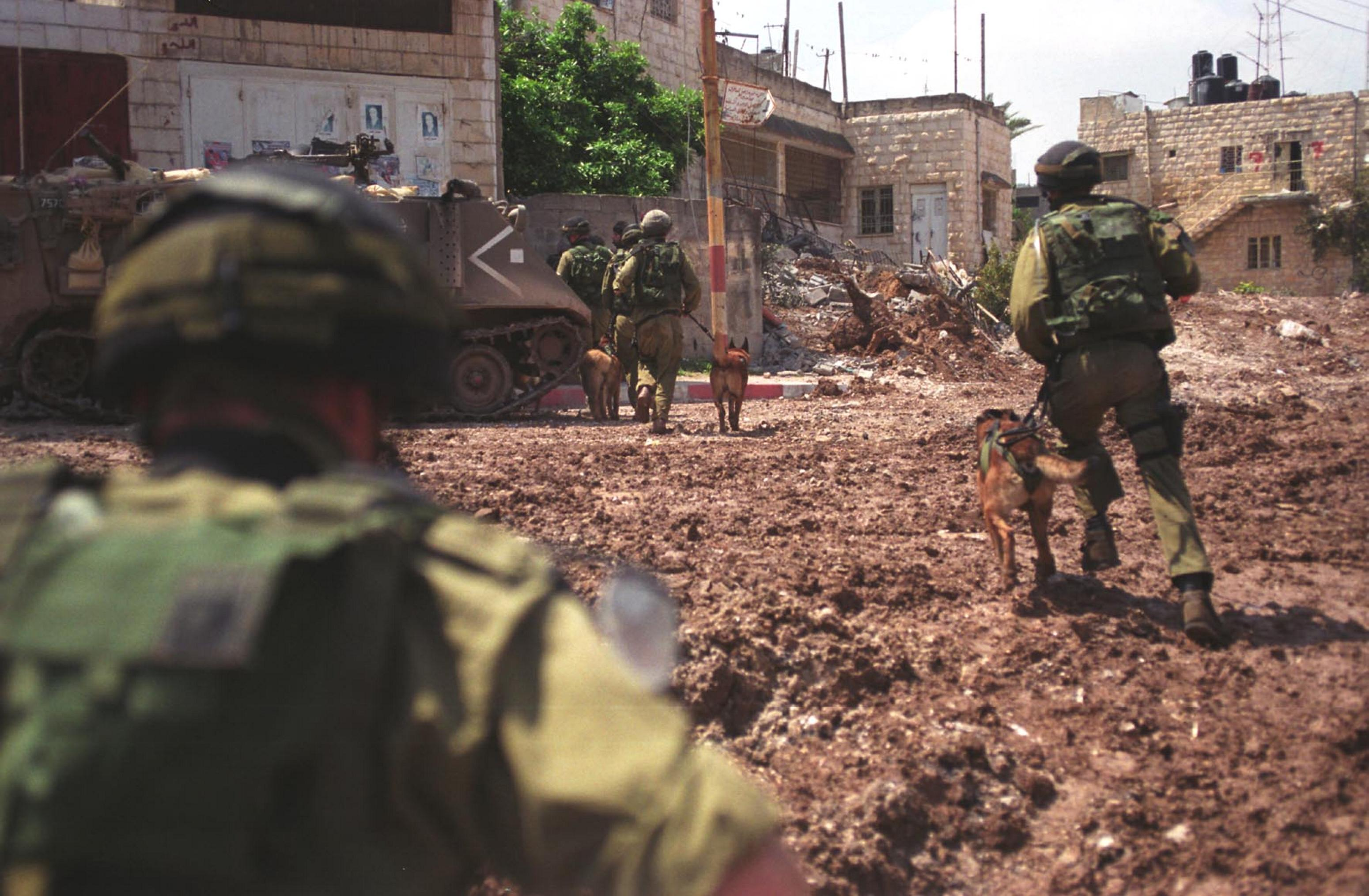 מבצע "חומת מגן" להריסת תשתיות הטרור ברשות הפלשתינית על ידי כוחות צה"ל. בצילום, חיילי צה"ל וכלביהם בפעילות מבצעית בג'נין.